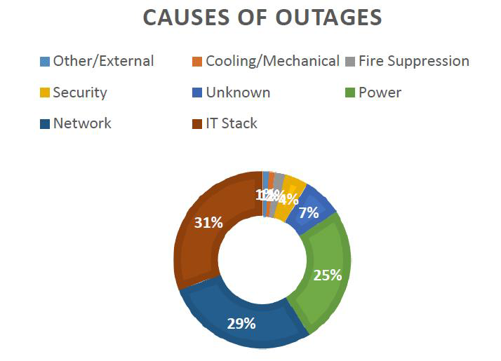 Pie chart des cuases d'incidents